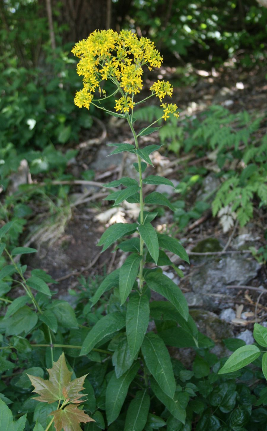 Steife Rauke (Sisymbrium strictissimum), Kreuzblütler (Brassicaceae) - Ungarn/Magyarország/Hungary: Pest megye, Burg Visegrád